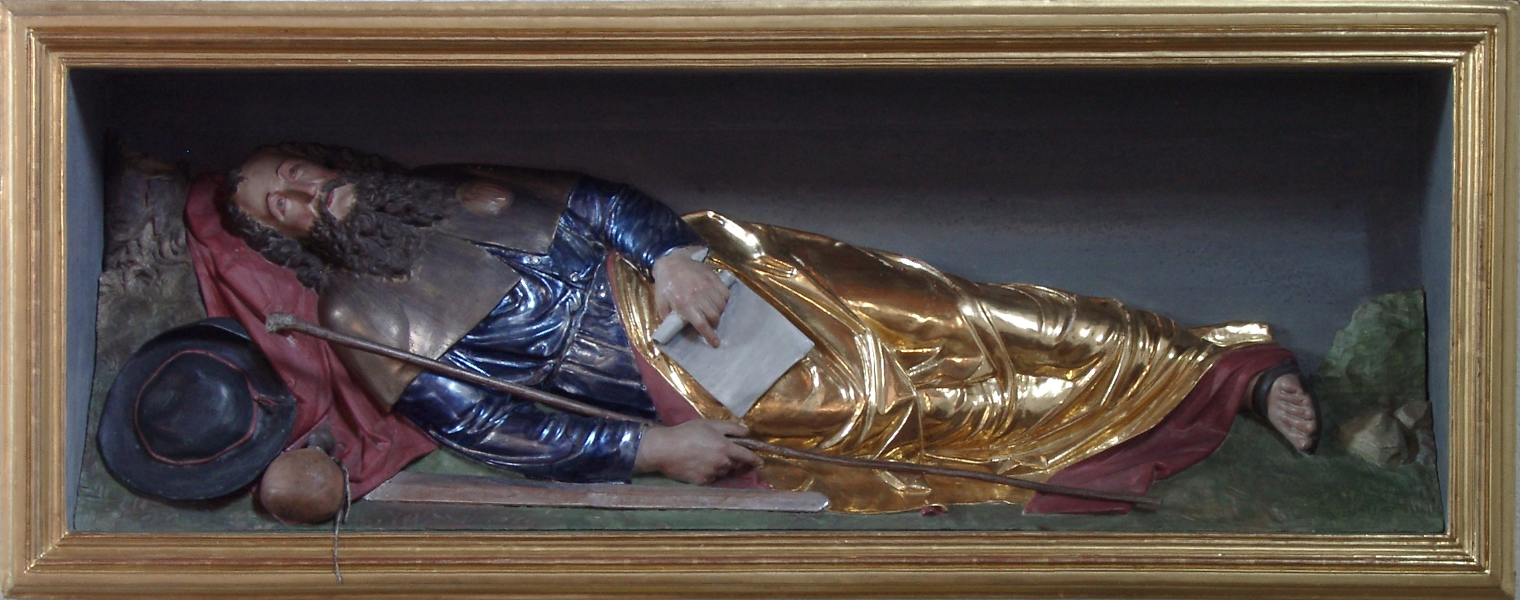 Der Hl. Jakobus der Ältere dargestellt liegend am Ölberg in der Kirche St. Jakob in Fischach-Wollmetshofen bei Augsburg